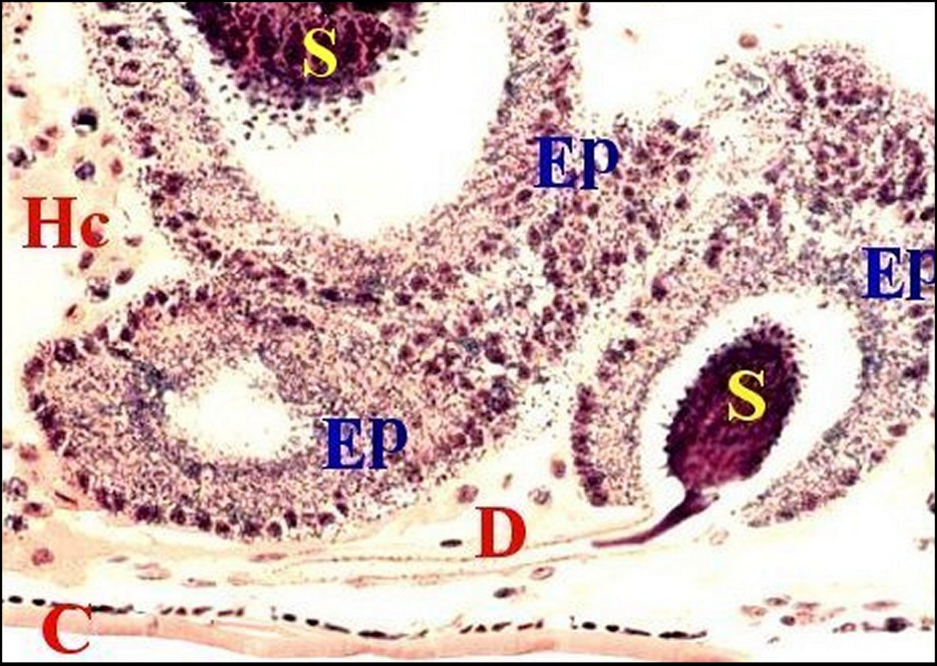 Glandes acinoïdes prégonoporales de Mygale Migide. Coupe histologique longitudinale..